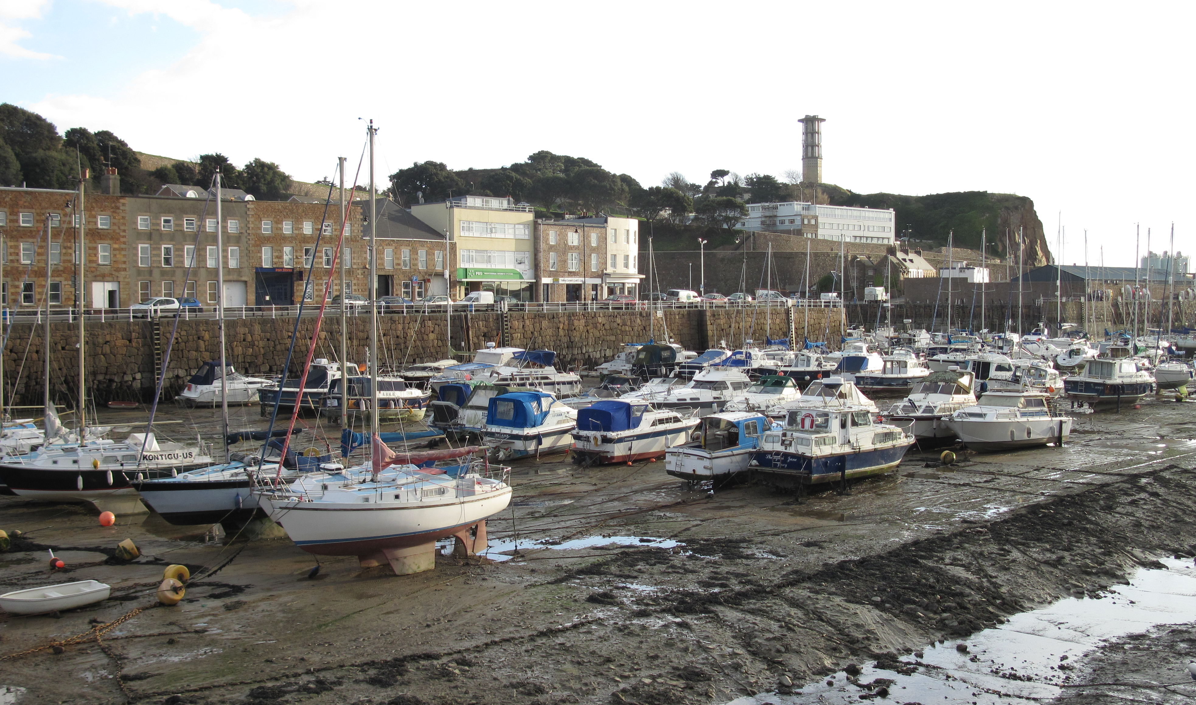 Nrf: Par les caûchies d'la Ville et l'Quartchi du Hâvre, Saint Hélyi, Jèrri, lé Jour d'l'An 2010